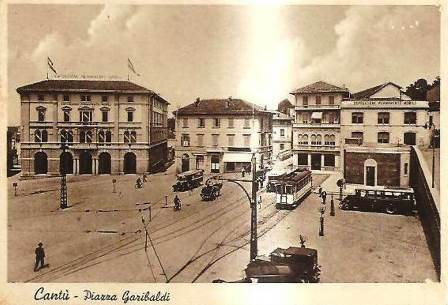 Cantù, piazza Garibaldi con tram.jpg